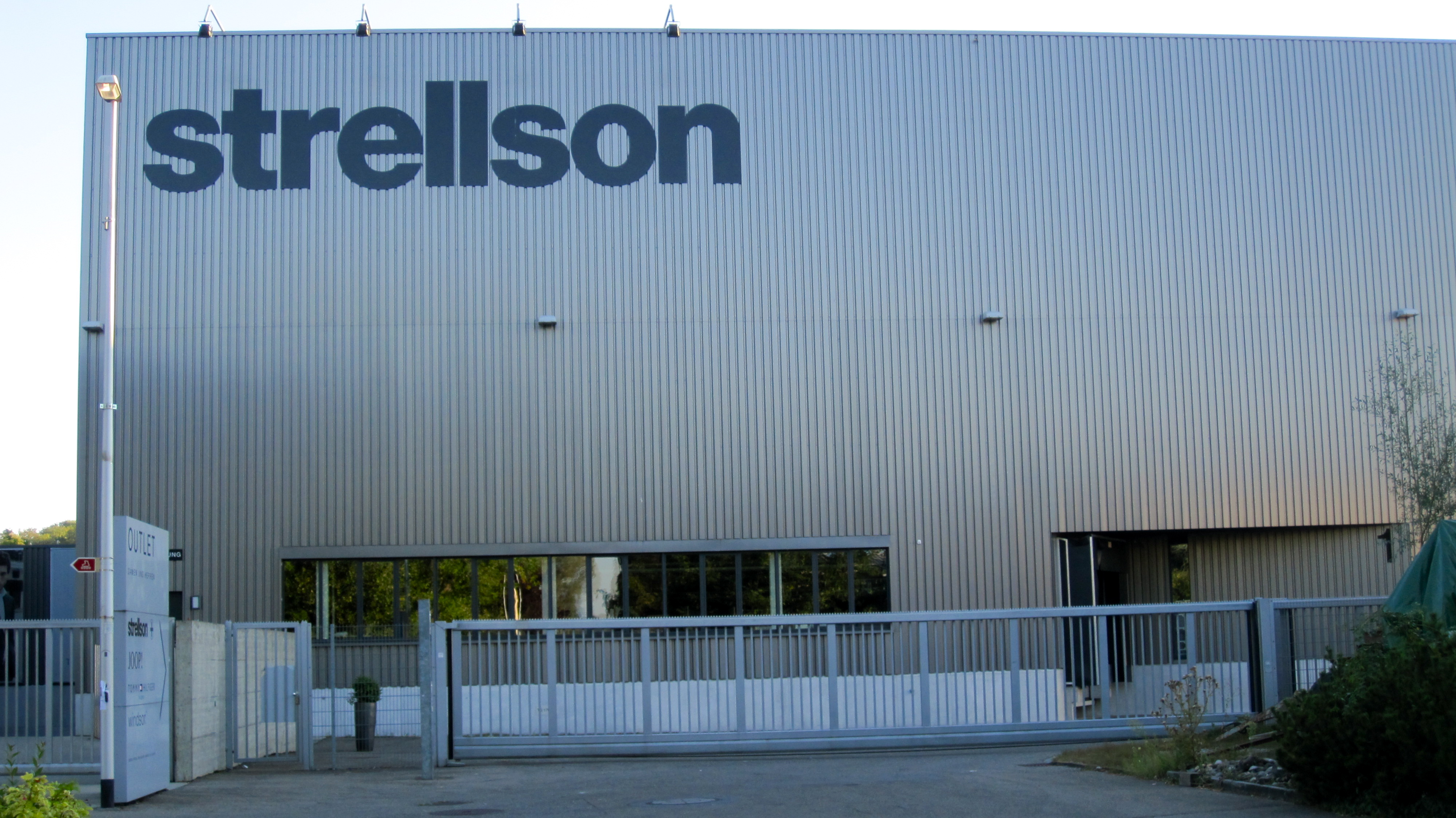 Gebäude der Holy Fashion Group in Kreuzlingen